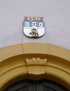 Historische Wappendarstellung der Stadt Freiberg über dem Eingangsportal des Rathauses in Freiberg